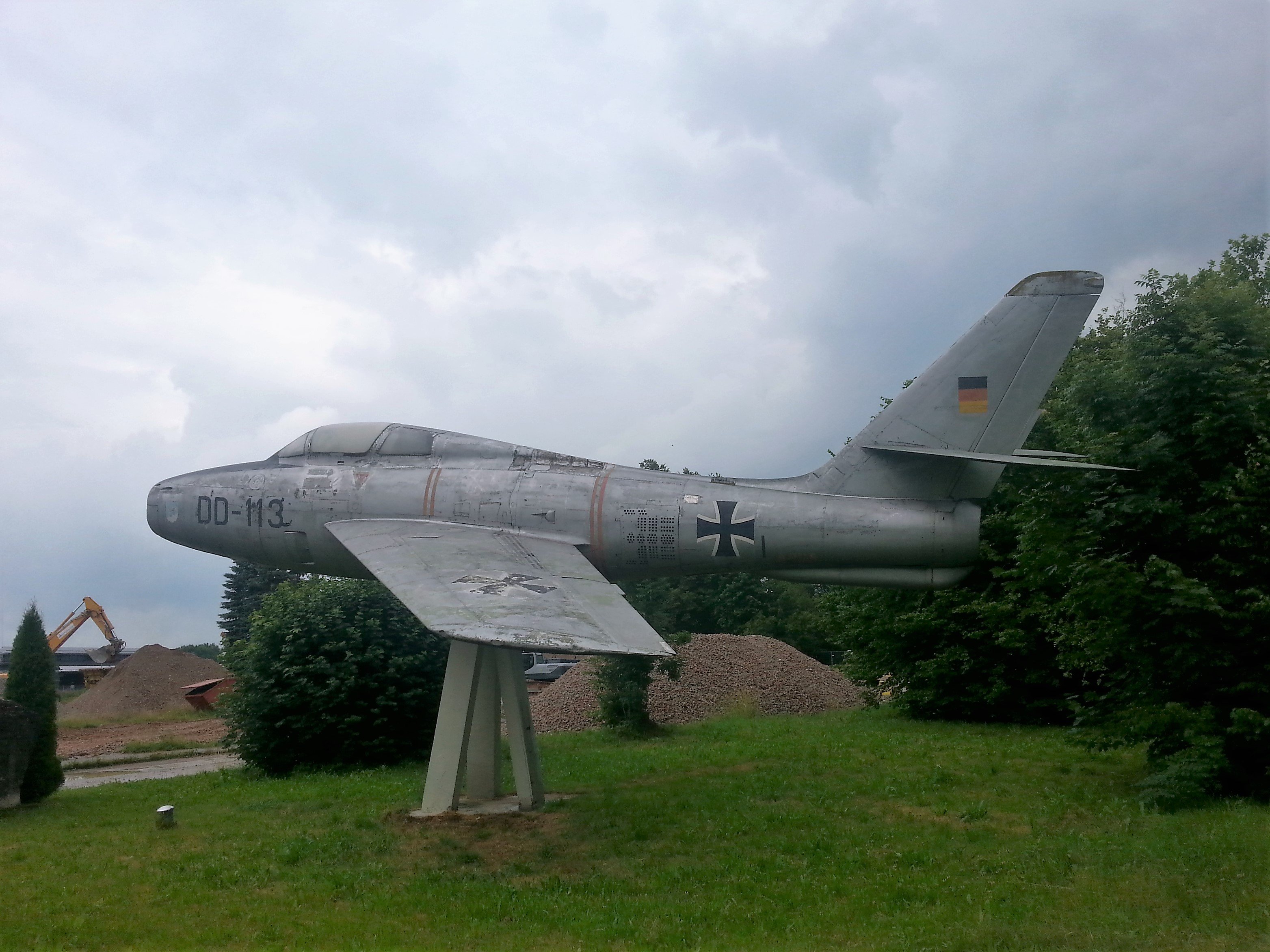 Republic F-84F Thunderstreak am ehemaligen Fliegerhorst Memmingen. Die Maschine mit der Kennung 'DD-113' gehörte zur 1. Staffel des Jagdbombergeschwader JaboG 34 der Bundesluftwaffe in Memmingen, von 1959 bis zur Einführung der F-104G Starfighter im Jahr 1964 bis 1966.